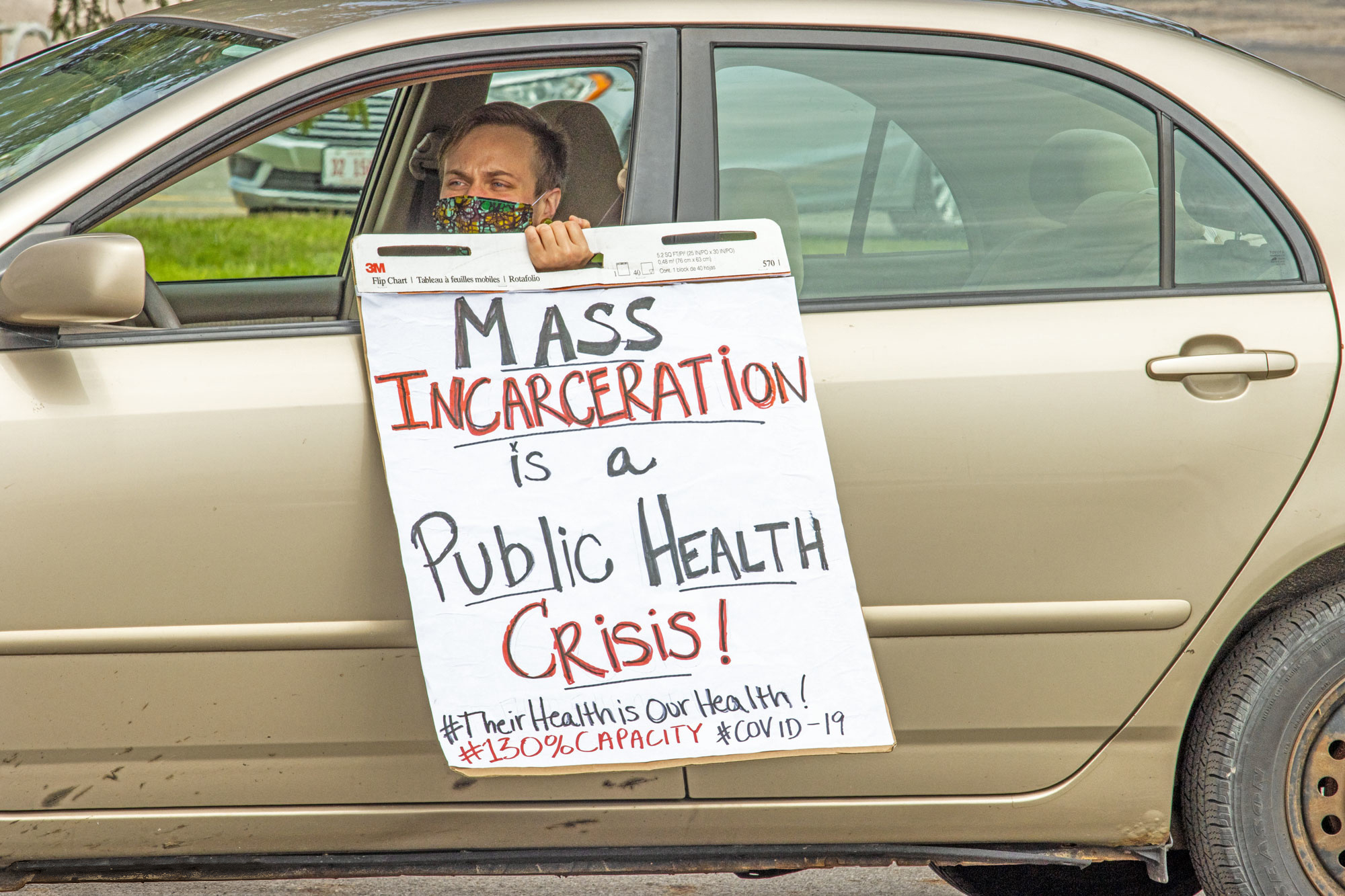 2IMG_0419